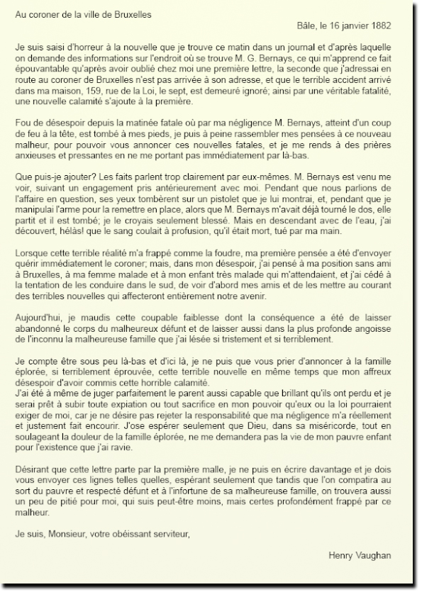 Lettre signée Henry Vaughan du 16 janvier 1882. Ecrite en fait par Léon Peltzer, l'assassin de Guillaume Bernays.